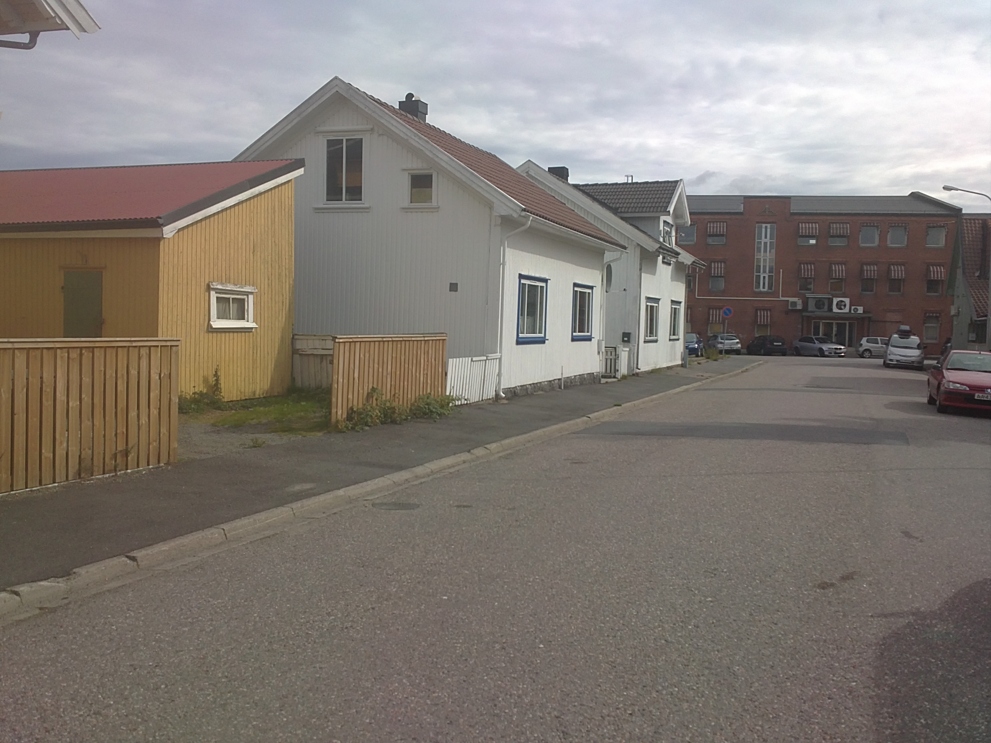 Bilde av hus i Furumogata, Larvik